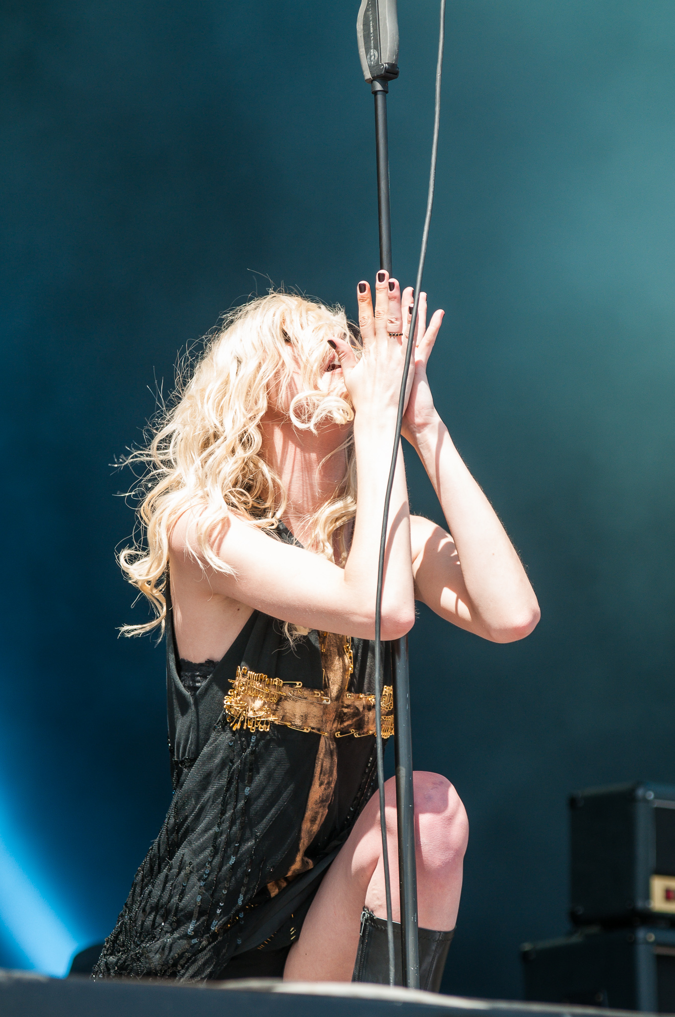 ARGO-Konzerte,Centerstage,Konzert,Livekonzert,Livemusik,Musik,RiP,Rock im Park 2014,Taylor Momsen,The Pretty Reckless